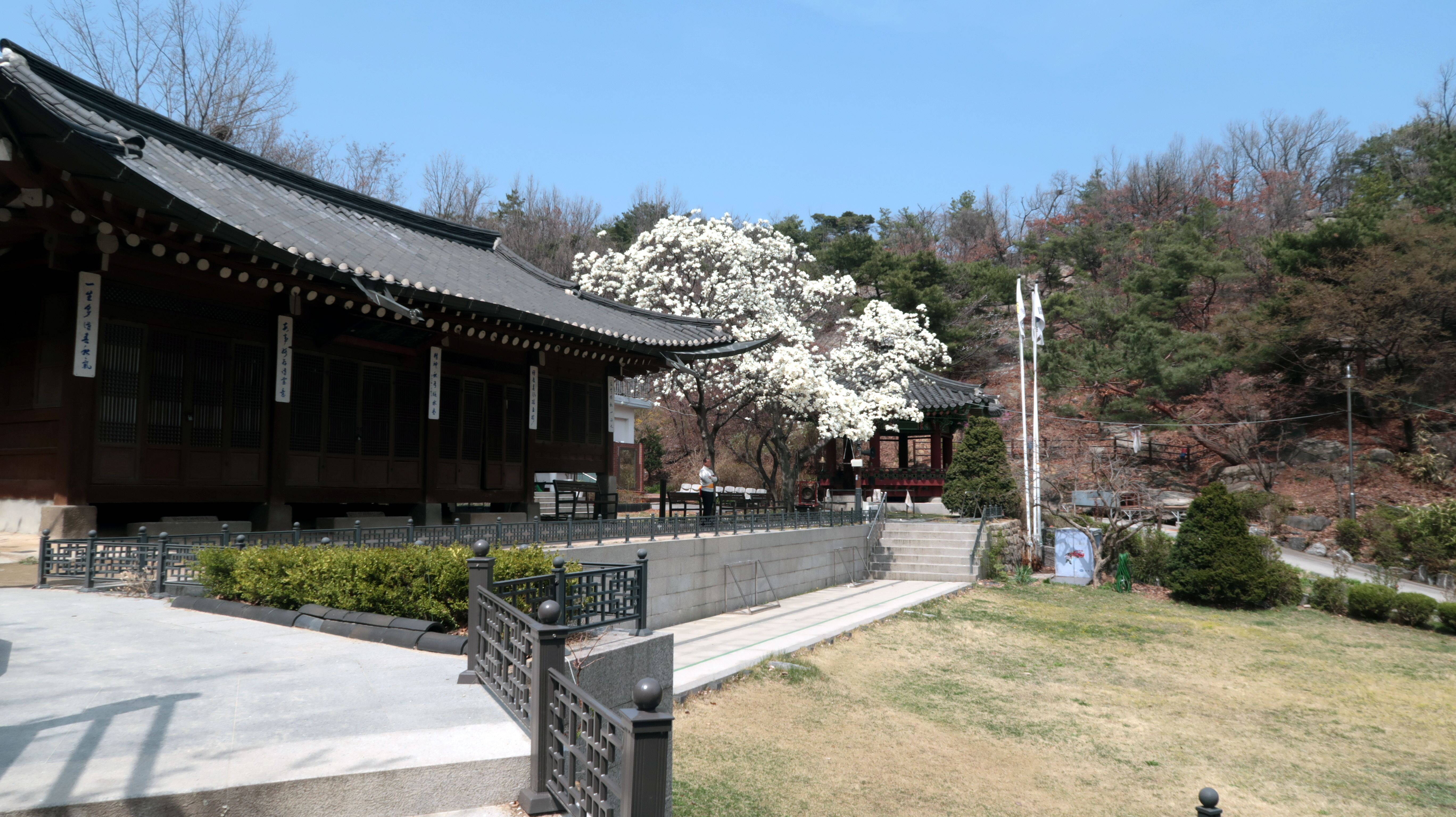 황학정 (서울 종로구 사직동 산1-1)